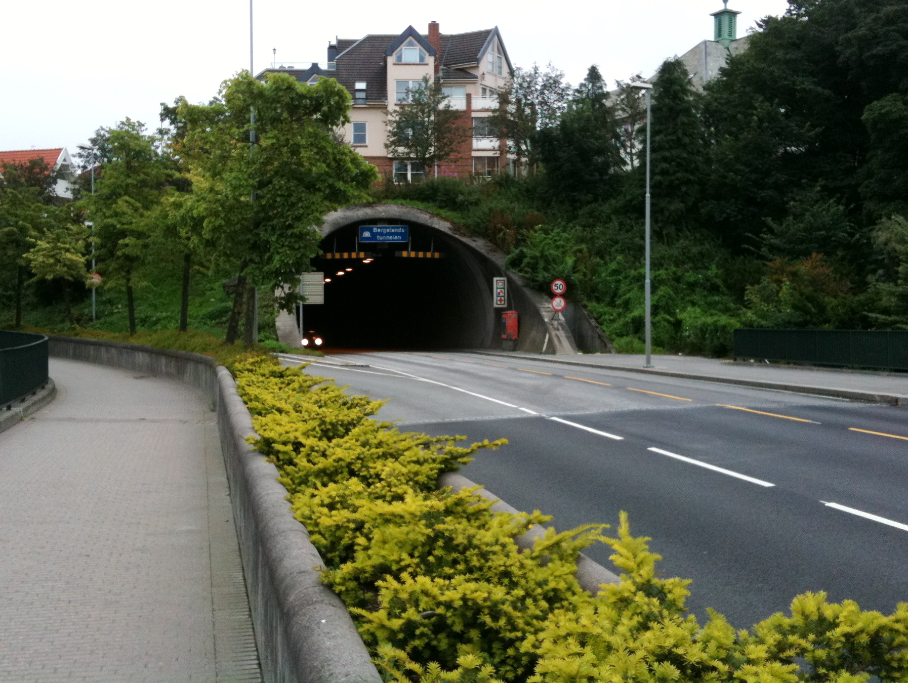 Bergelandstunnelen i Stavanger